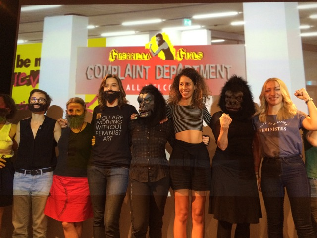 You are nothing without feminist art, photo Marie Docher, Colloque Art et activisme, maison de la Sacd, Paris, 9 septembre 2016, La Barbe, Guerrilla Girls et Femen réunies, dont Inna Shevchenko , à droite.